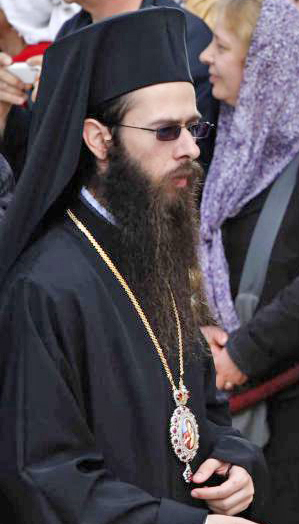 Държавният глава присъства на тържествена света литургия, отслужена от Патриарх Неофит в базиликата на Националния историко-археологически резерват „Плиска".